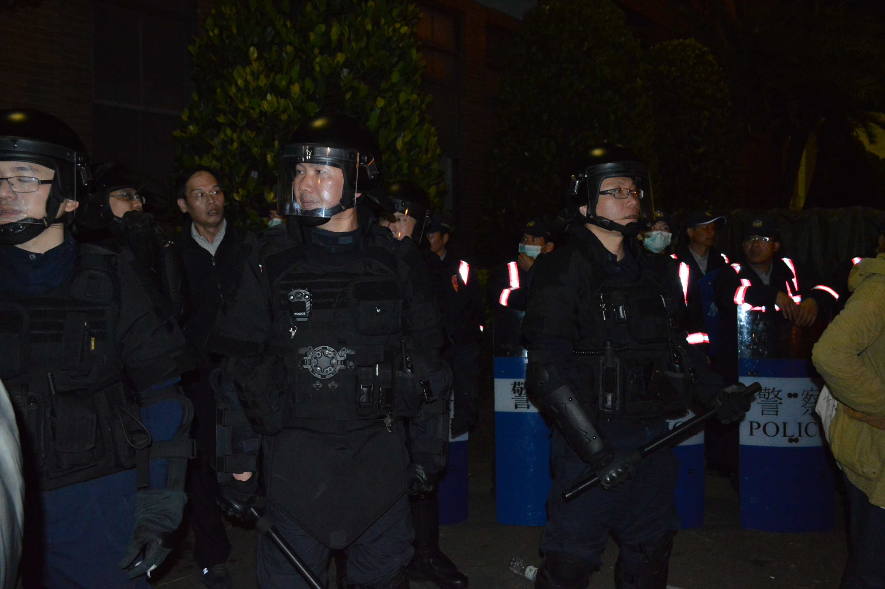 特警在行動。